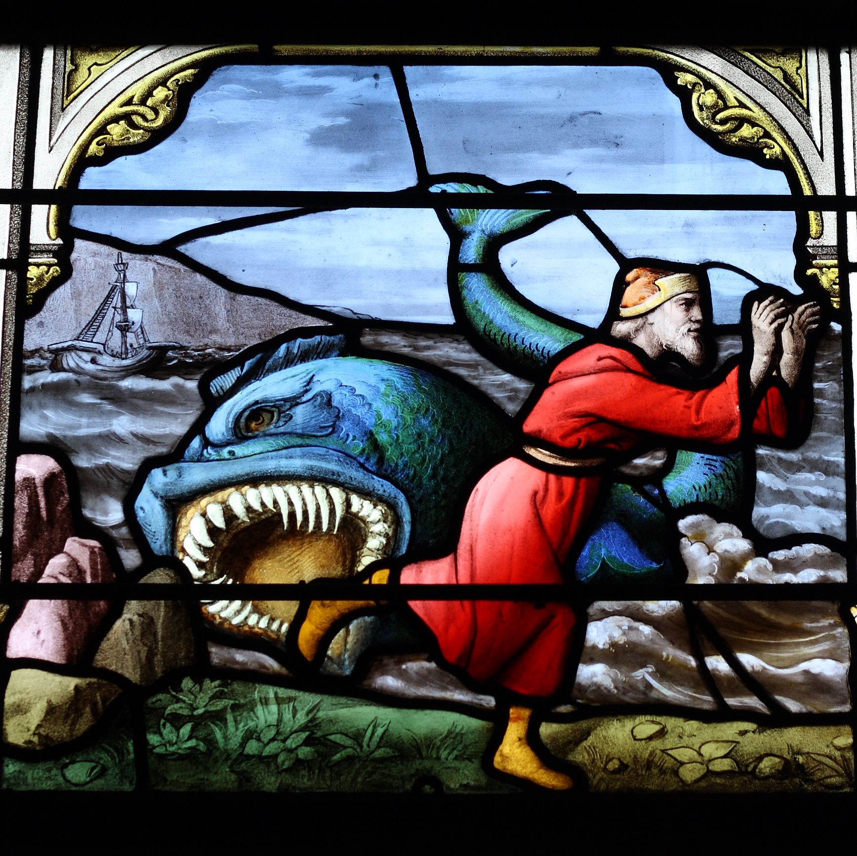 Bleiglasfenster (Ausschnitt) in der katholischen Pfarrkirche Église Saint-Aignan de Chartres in Chartres, Darstellung: Jonas entsteigt heil dem Wal